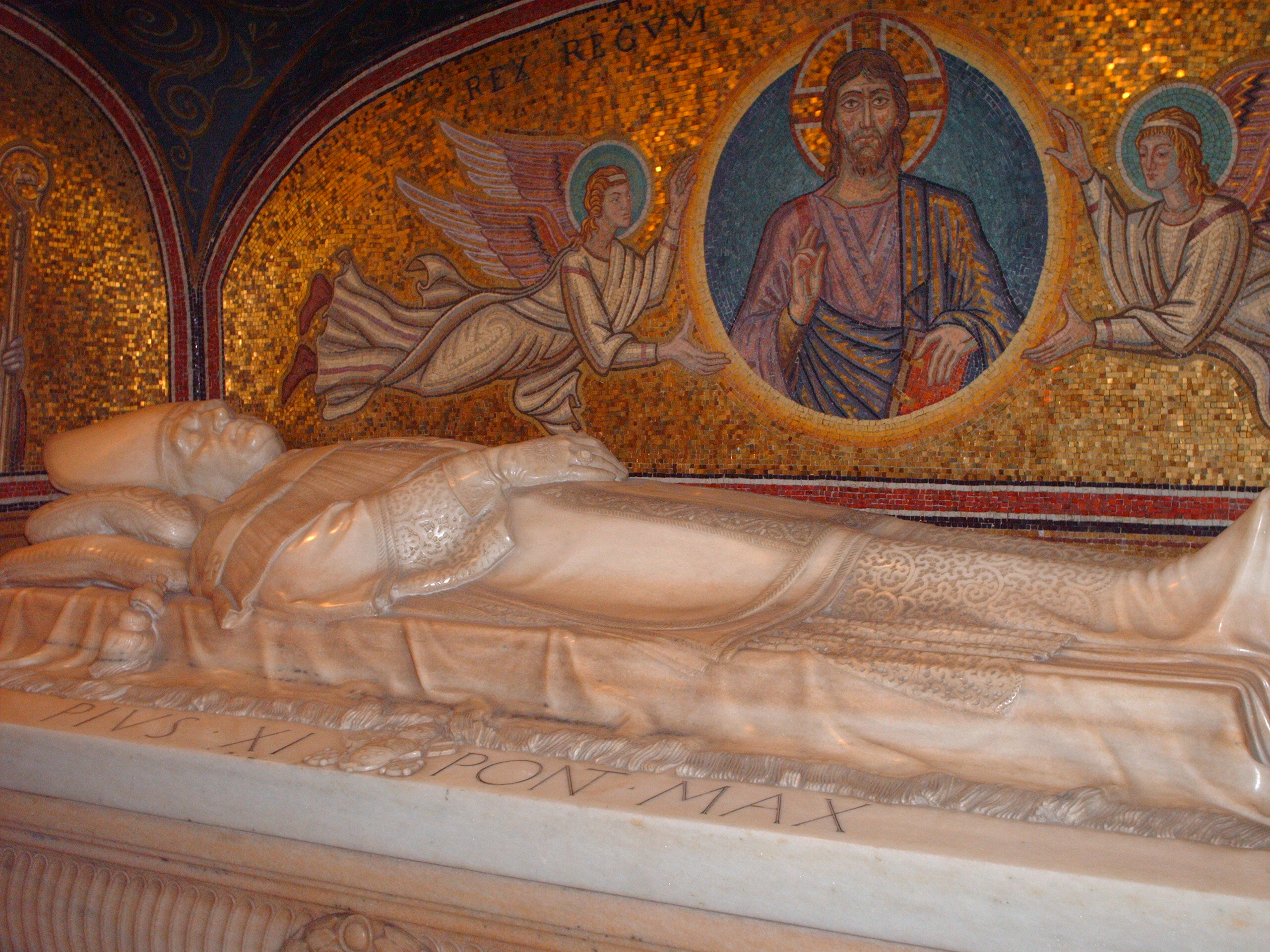 Tomb of Pius XI, "grotte vaticane", Basilica di San Pietro